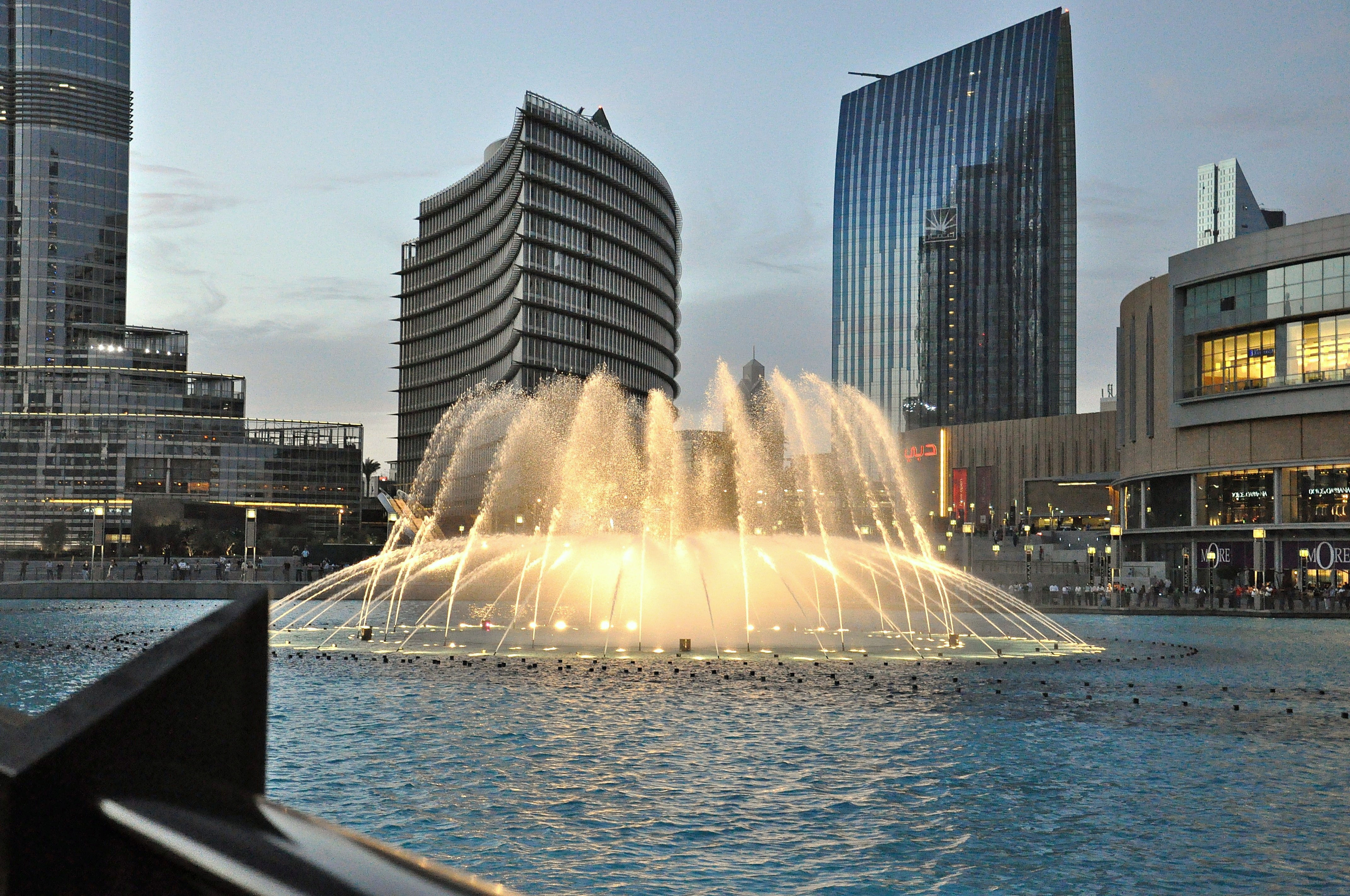 emiratos arabes